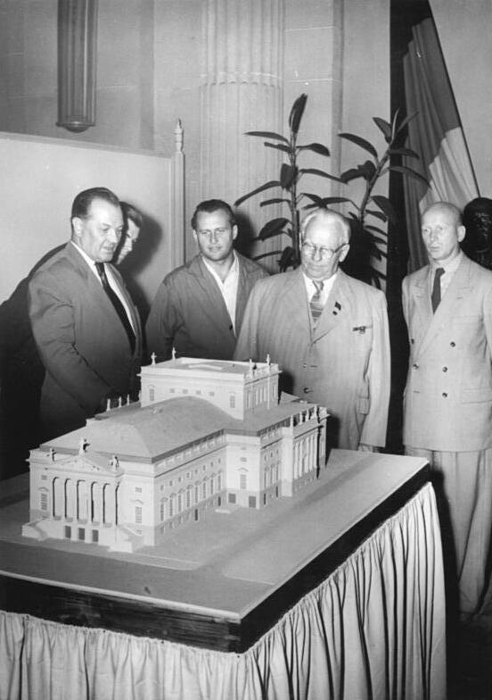 Zentralbild Sturm 8.9.1955 Präsident Wilhelm Pieck besuchte die Ausstellung "215 Jahre Deutsche Staatsoper"-Präsident Wilhelm Pieck besuchte am 8. September 1955 die Ausstellung "215 Jahre Deutsche Staatsoper" die gegenwärtig im Lichthof der Staatsbibliothek in Berlin gezeigt wird. UBz: Der Architekt Professor Paulick (links) erklärt Präsident Wilhelm Pieck an einem Modell der Deutschen Staatsoper architektonische Einzelheiten.